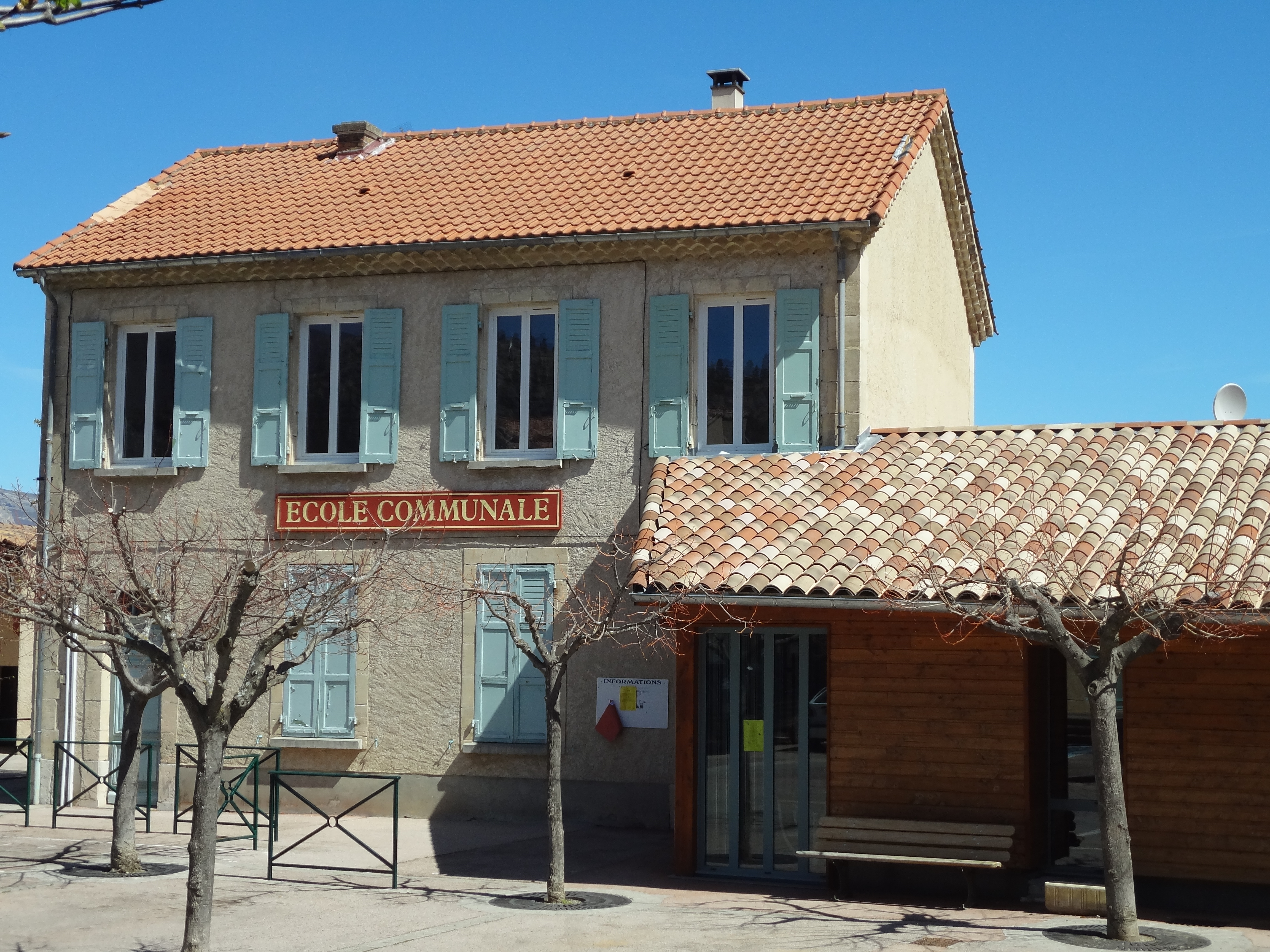 avec l’extension à droite